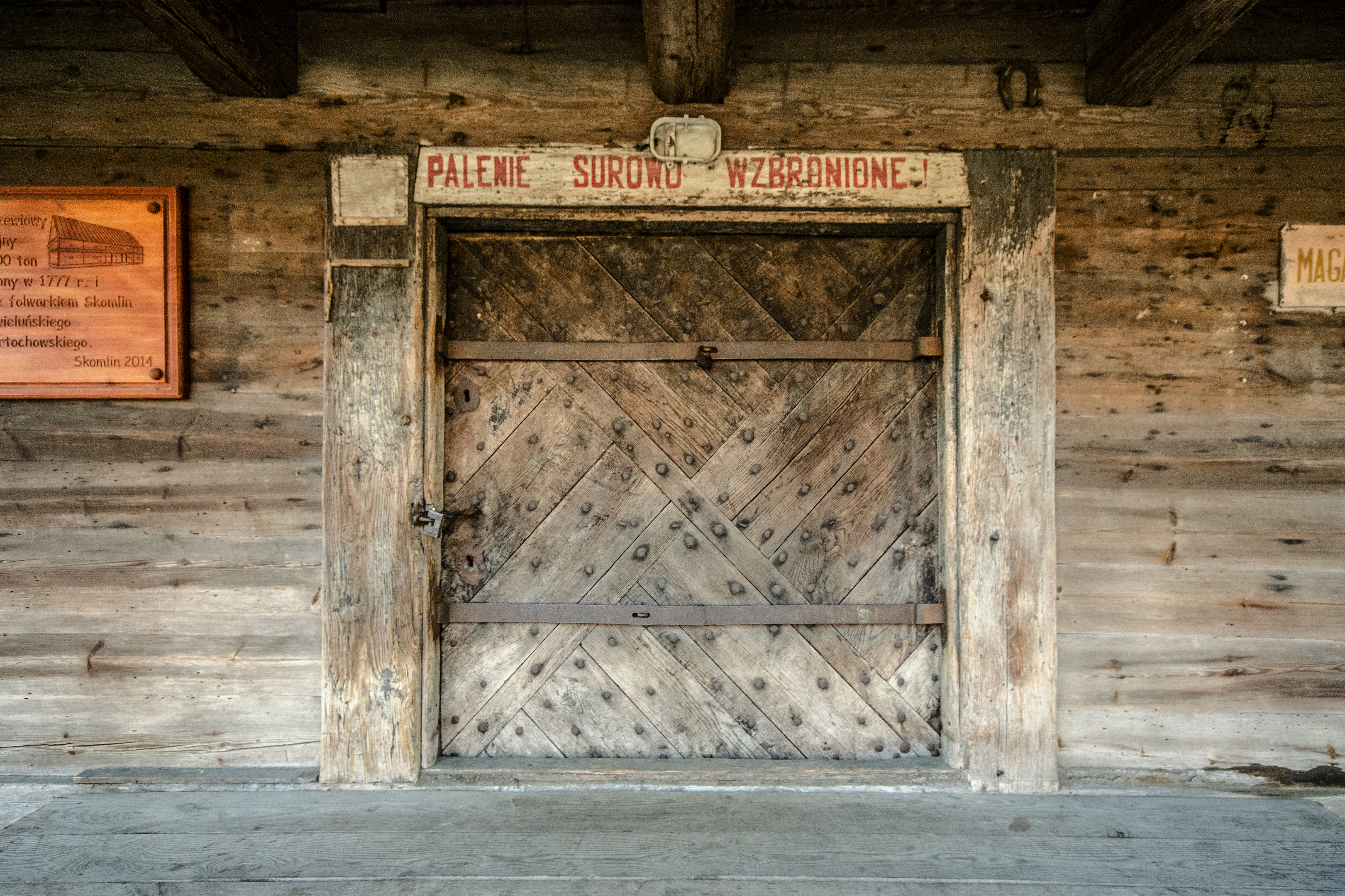 Skomlin, spichrz, 1777 - wejście